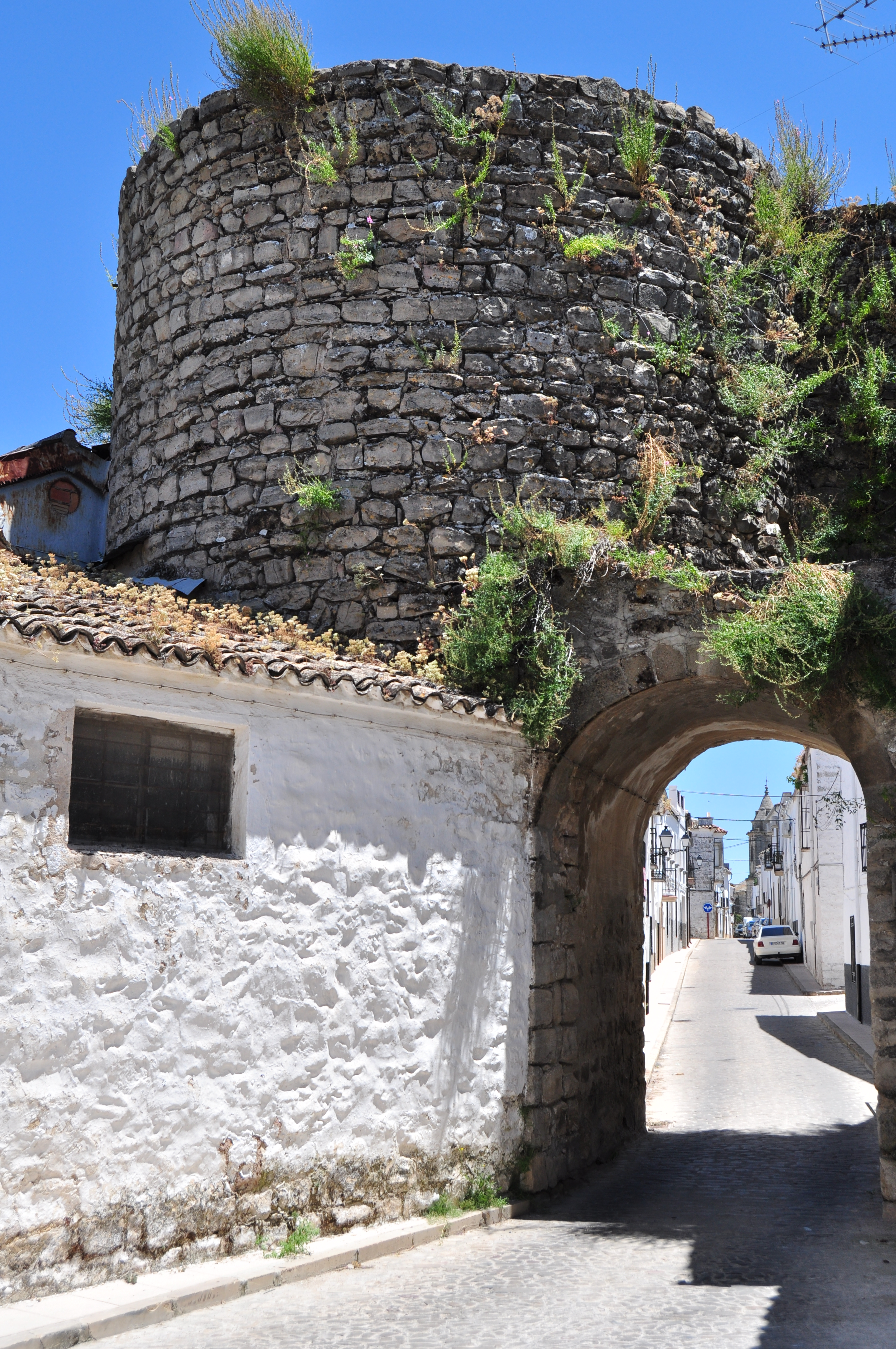 Sabiote - 002